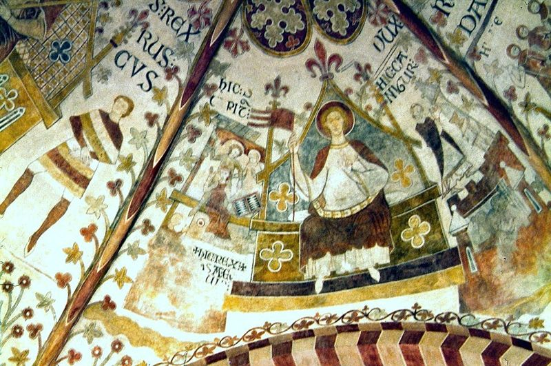 Ringsted Sankt Bendts Kirke i Danmark. Korsskæringens kalkmalerier. Knud Lavard